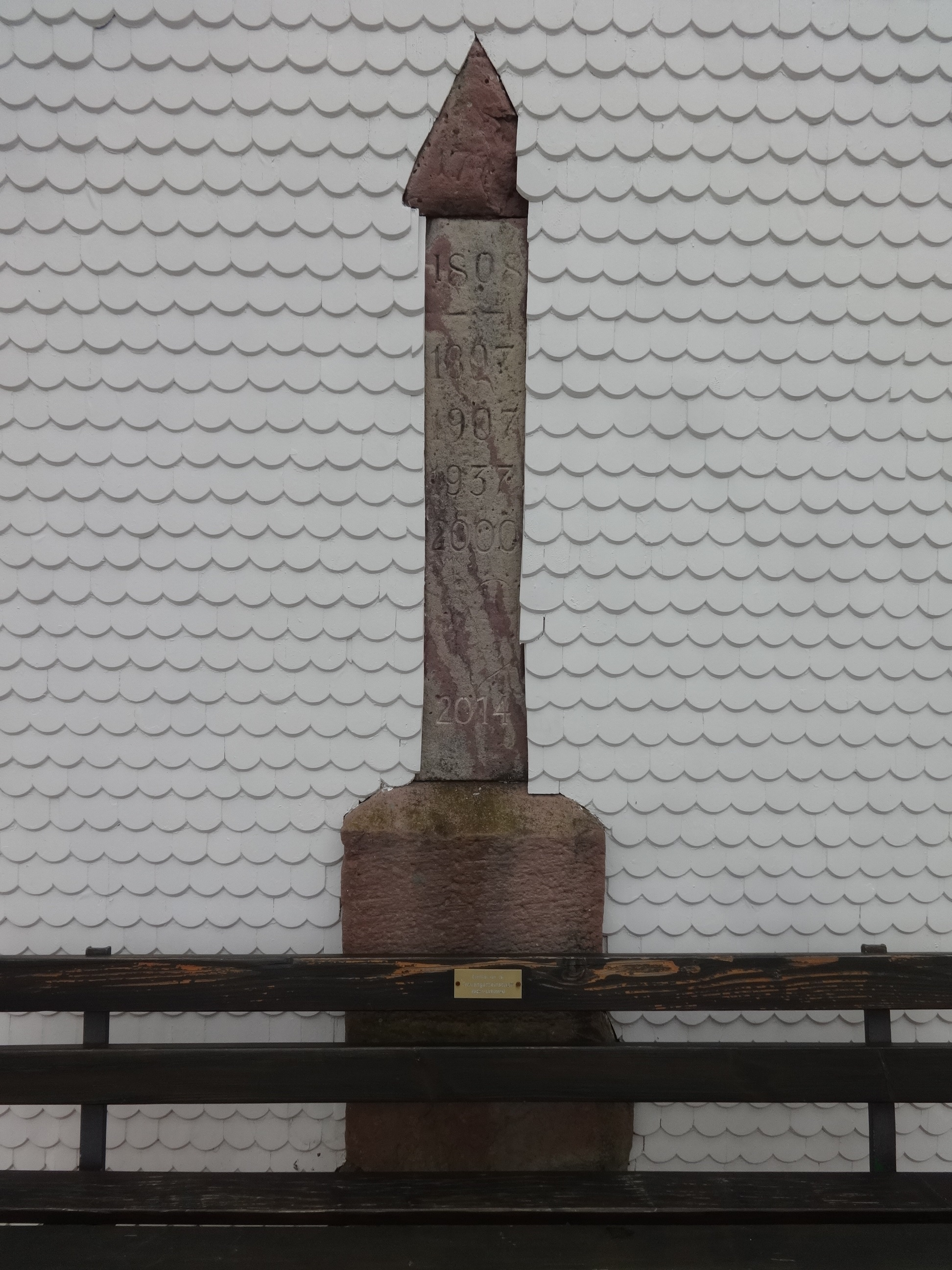 Die Marienkapelle ist ein denkmalgeschütztes Bauwerk im Baden-Badener-Ortsteil Lichtental. Es geht auf einen Bildstock aus dem Jahr 1770 zurück und wurde in seiner über 240-jährigen Geschichte mehrfach umgebaut und renoviert. In seinem Innern befindet sich ein Gemälde von Josef Kentenich, dem Gründer der Schönstattbewegung.